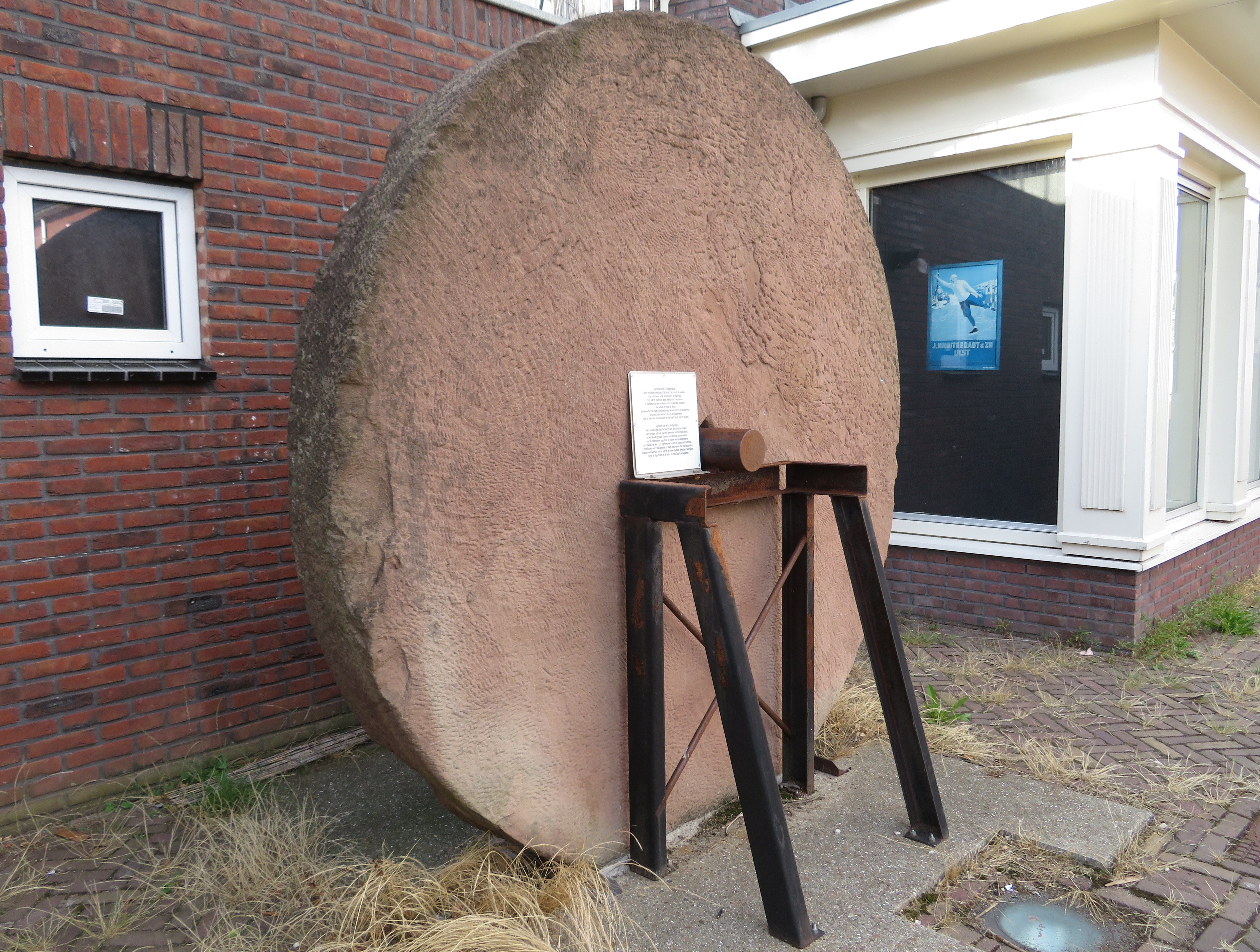 Slijpsteen uit de voormalige schaatsenfabriek Nooitgedagt in IJlst, Friesland